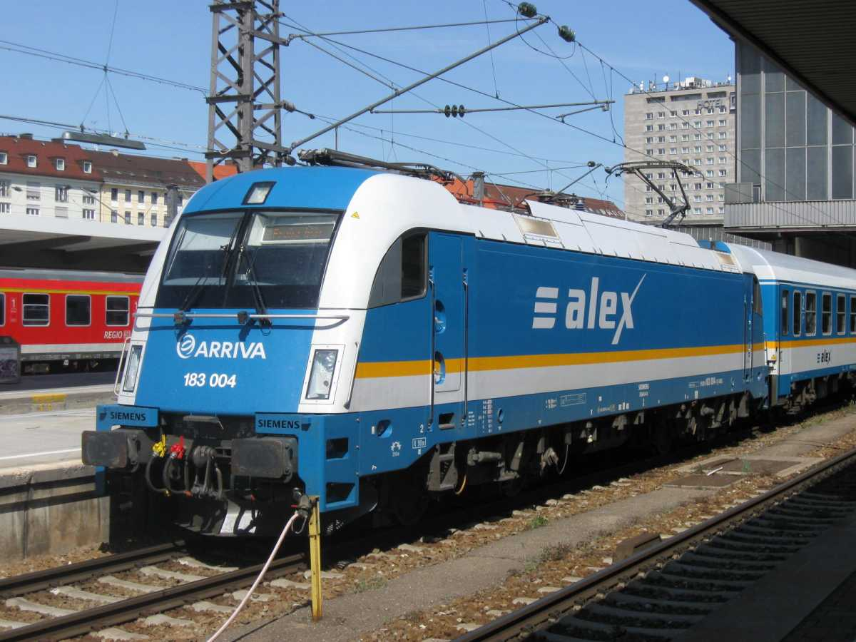 Arriva Baureihe 183 München Hbf